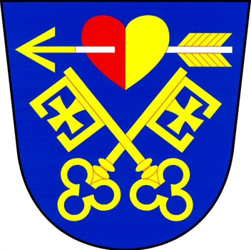 znak, Střelice, okres Znojmo